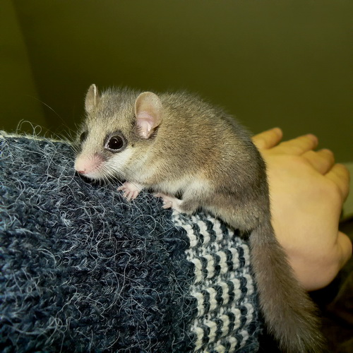 Африканская соня (Graphiurus murinus), Пльзенский зоопарк (Zoological and Botanical Garden Plzen), февраль 2011 года